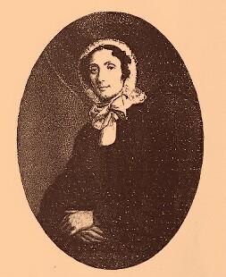 Laura Mantegazza (1813-1873) benefattrice